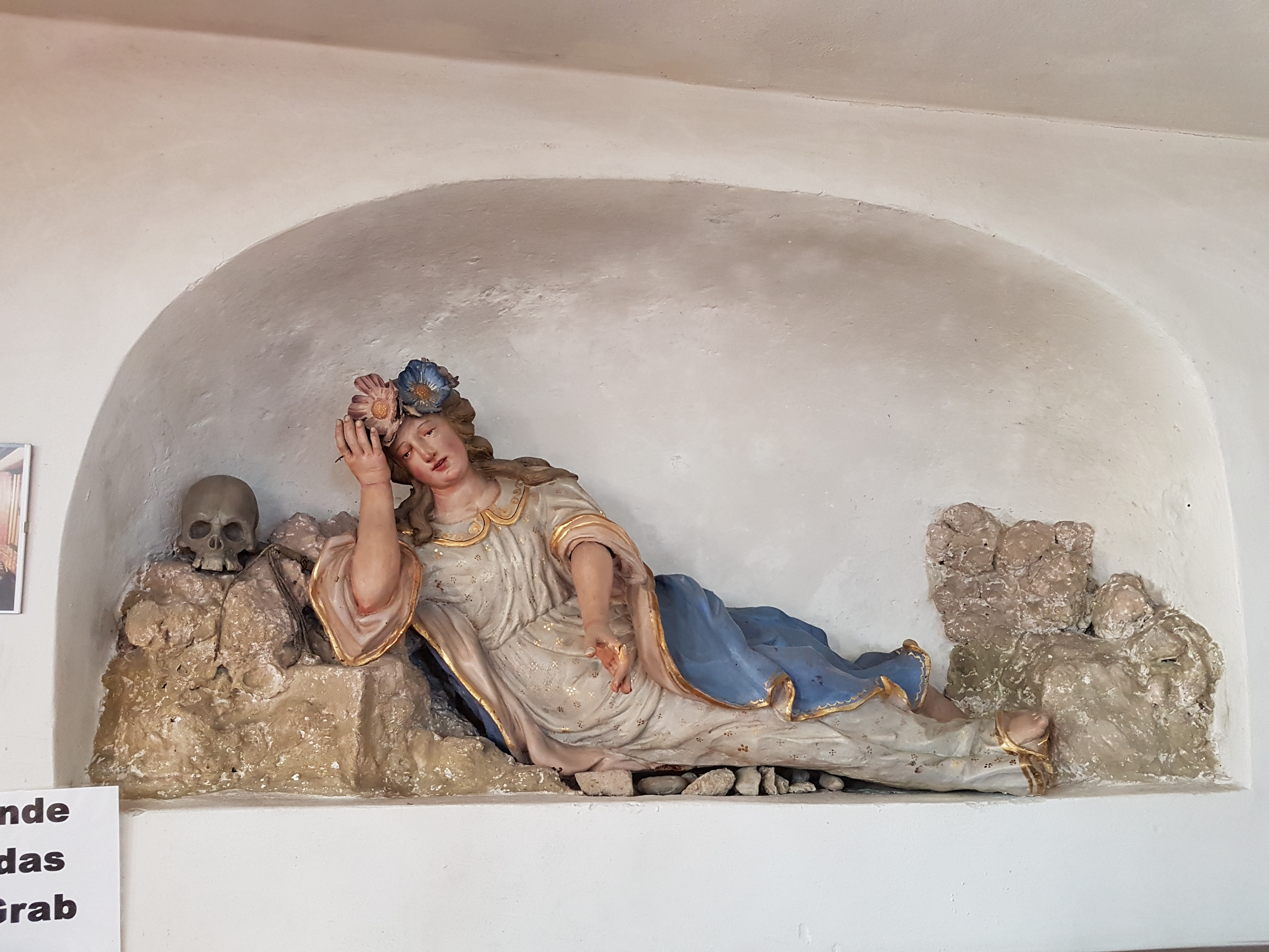 Holzburg (Ried bei Mering), Kirche. Figur der hl. Rosalia von Johann Caspar Öberl